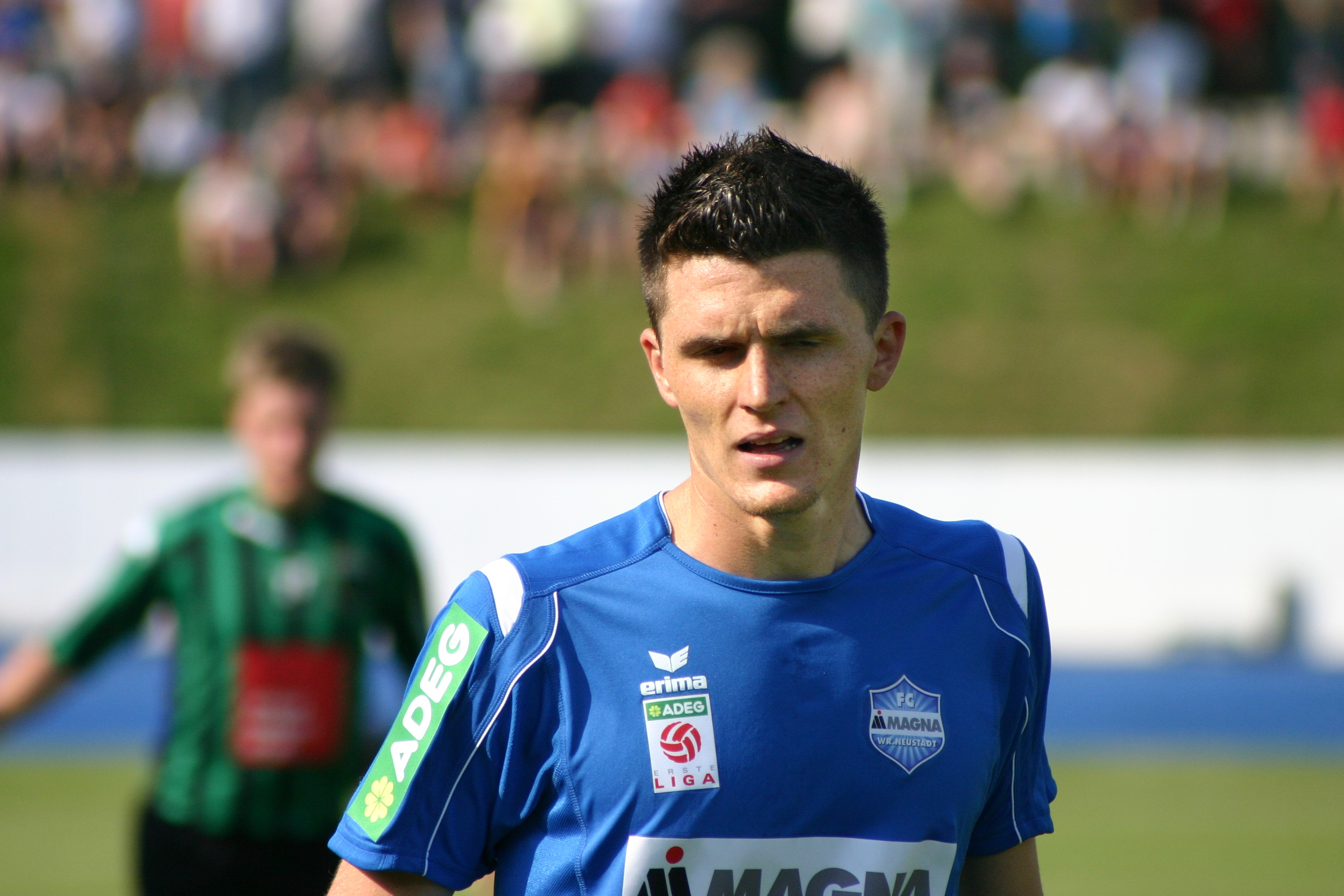 Manuel Hartl, FC Magna Wiener Neustadt